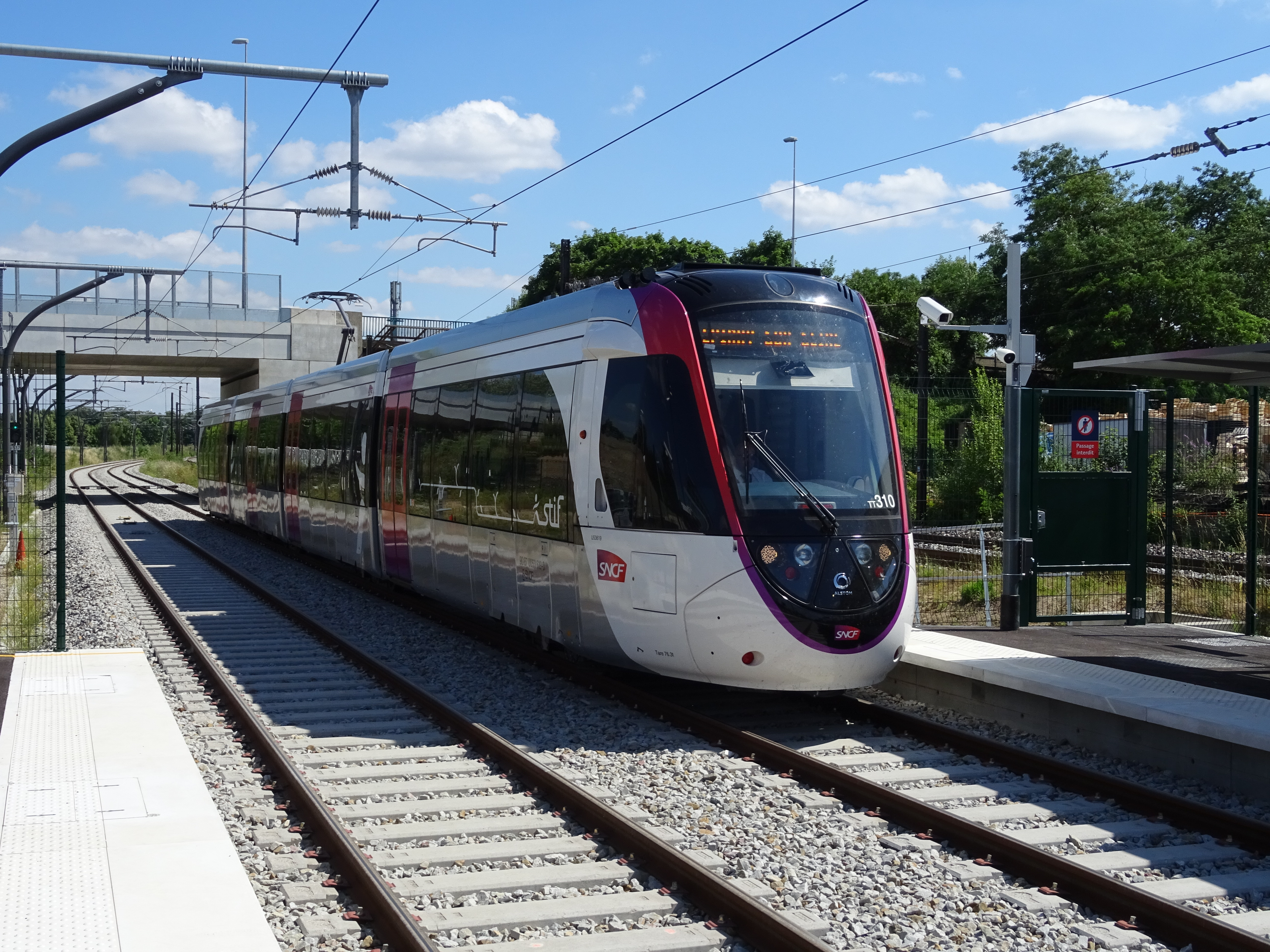 U 53600 à quai à Dugny-La Courneuve